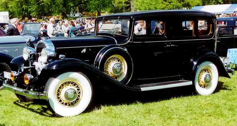 1932 Buick Series 80 Model 87 4-Door Sedan